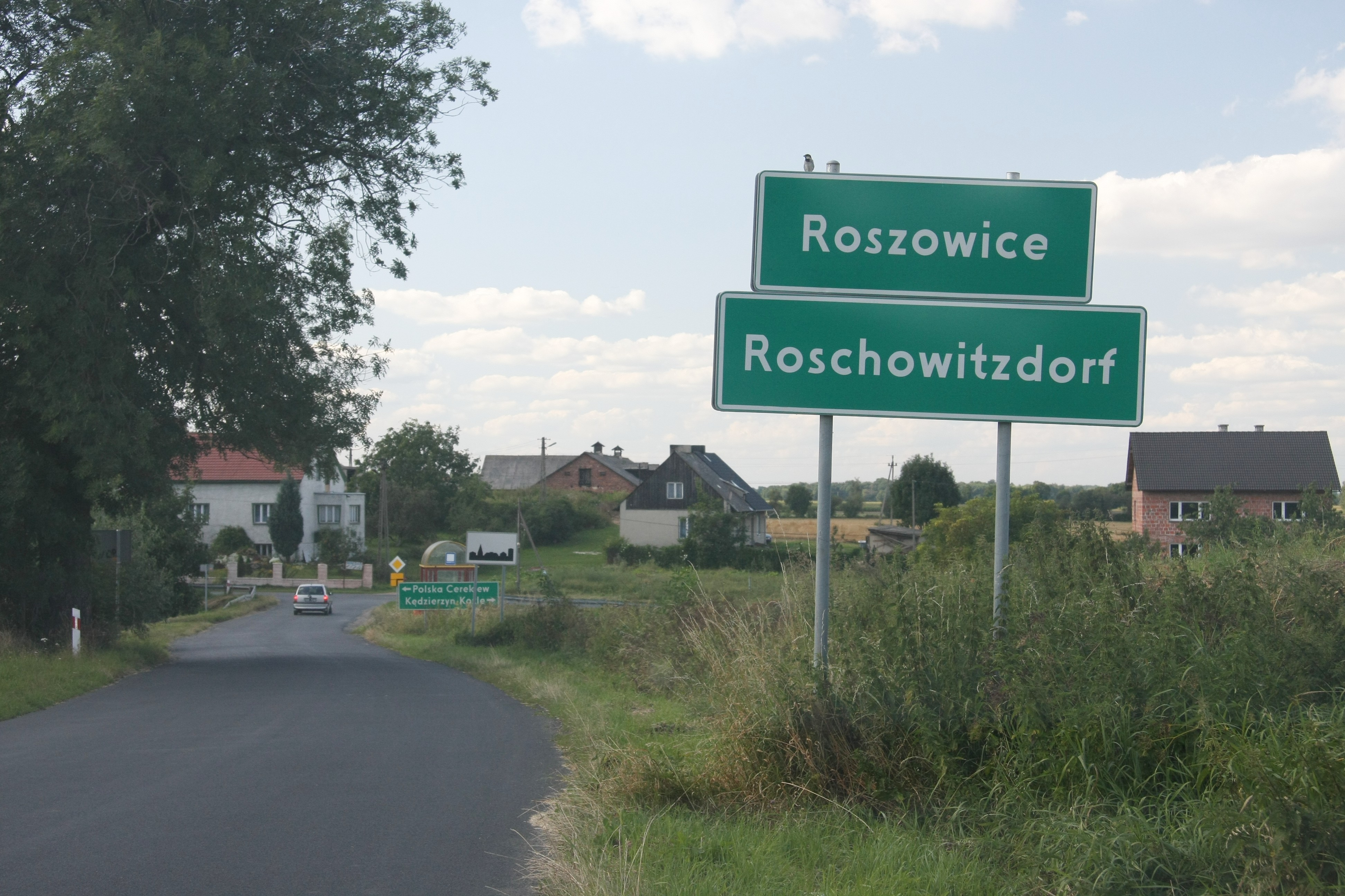 Dwujęzyczna tablica z nazwą przed wjazdem do Roszowic